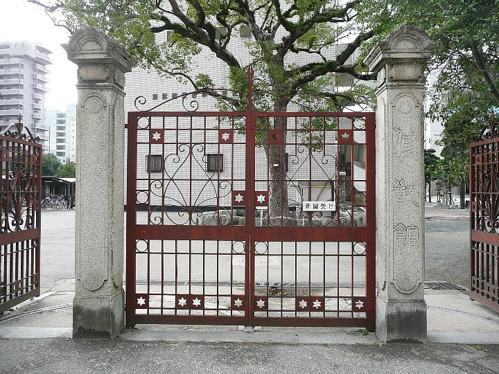 修猷館高校旧正門